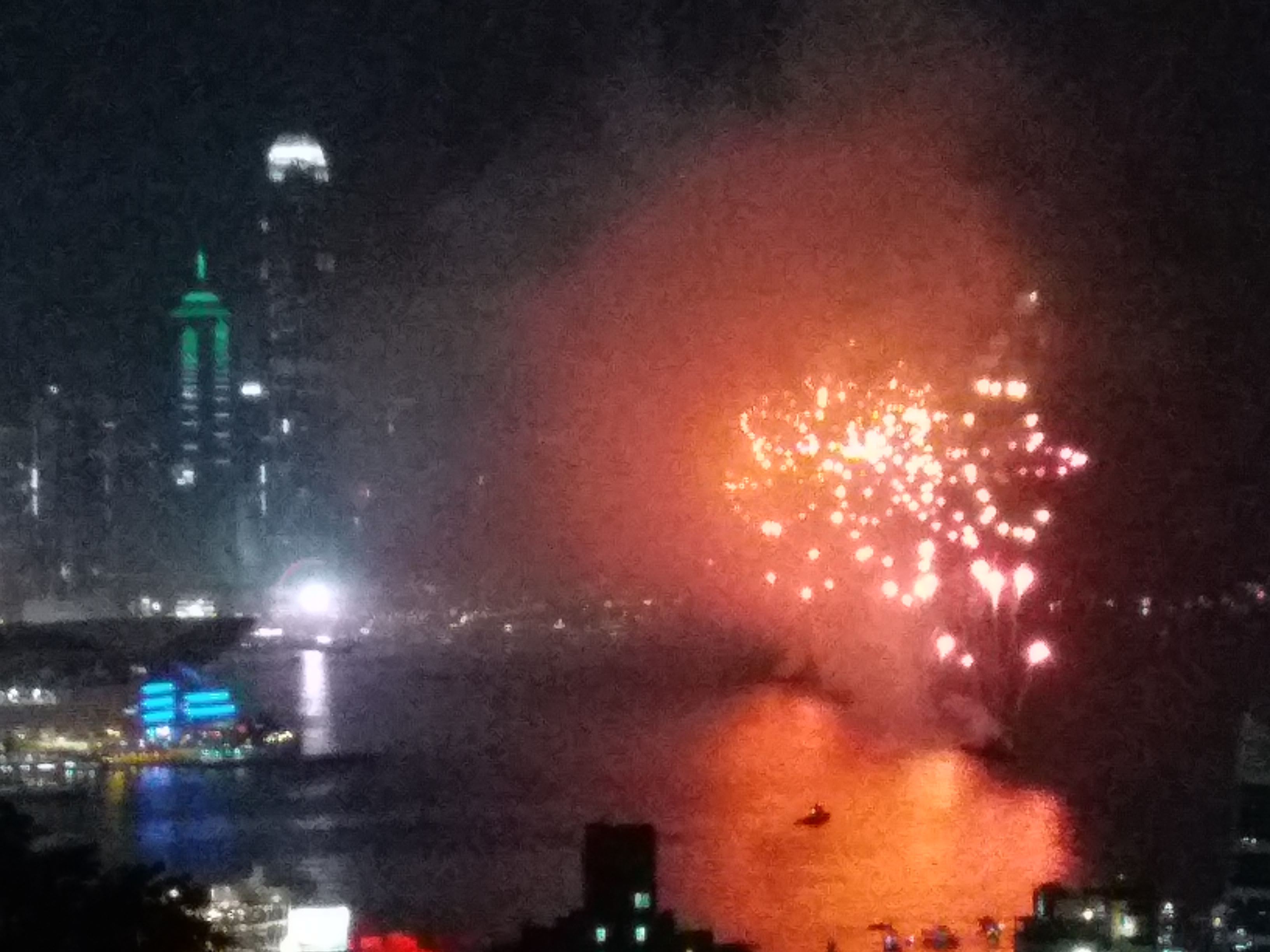 2018年香港慶祝中華人民共和國國慶煙花匯演第七幕「紅日之火」的「立體環圖形」煙花